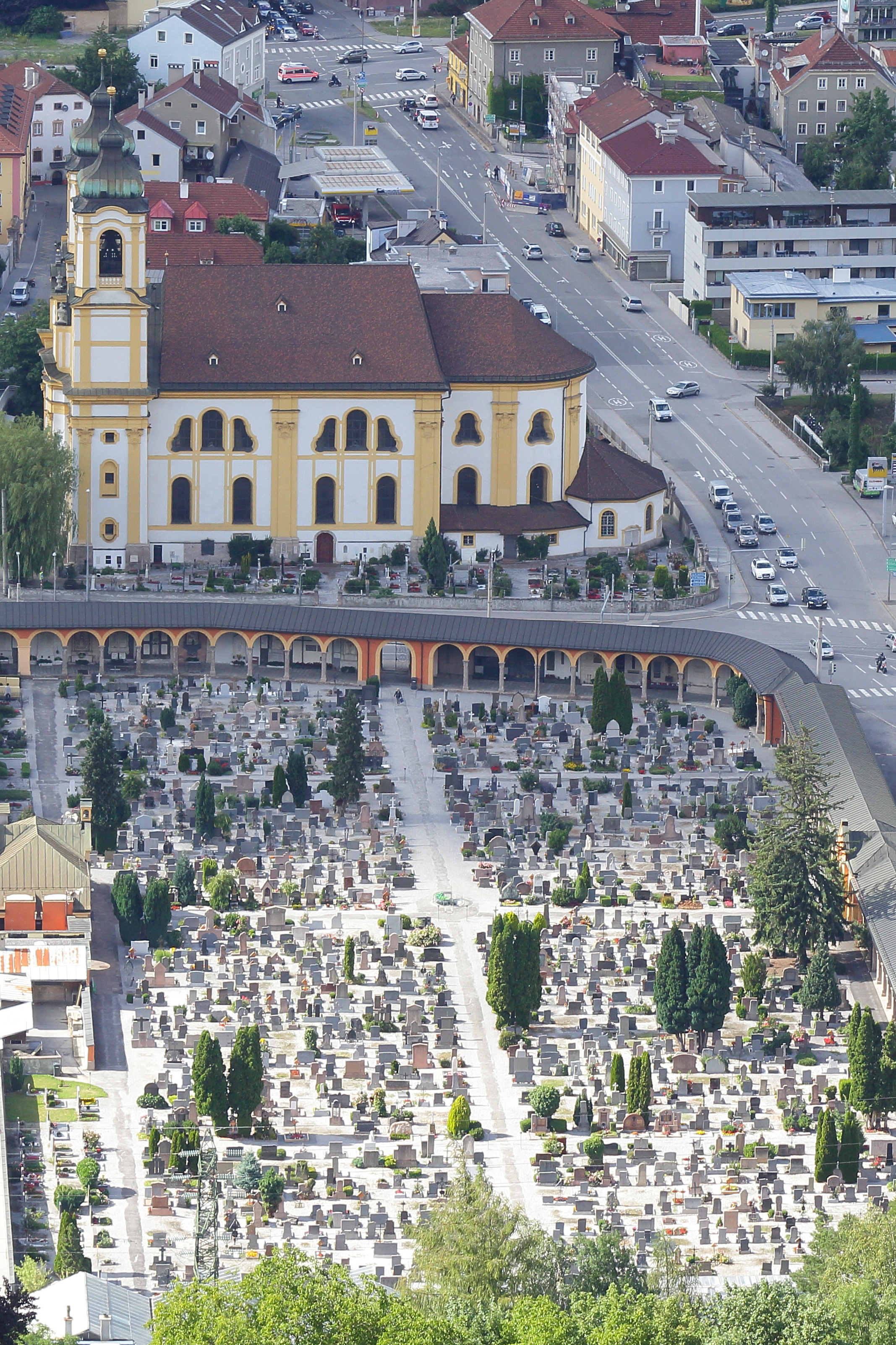 Innsbruck